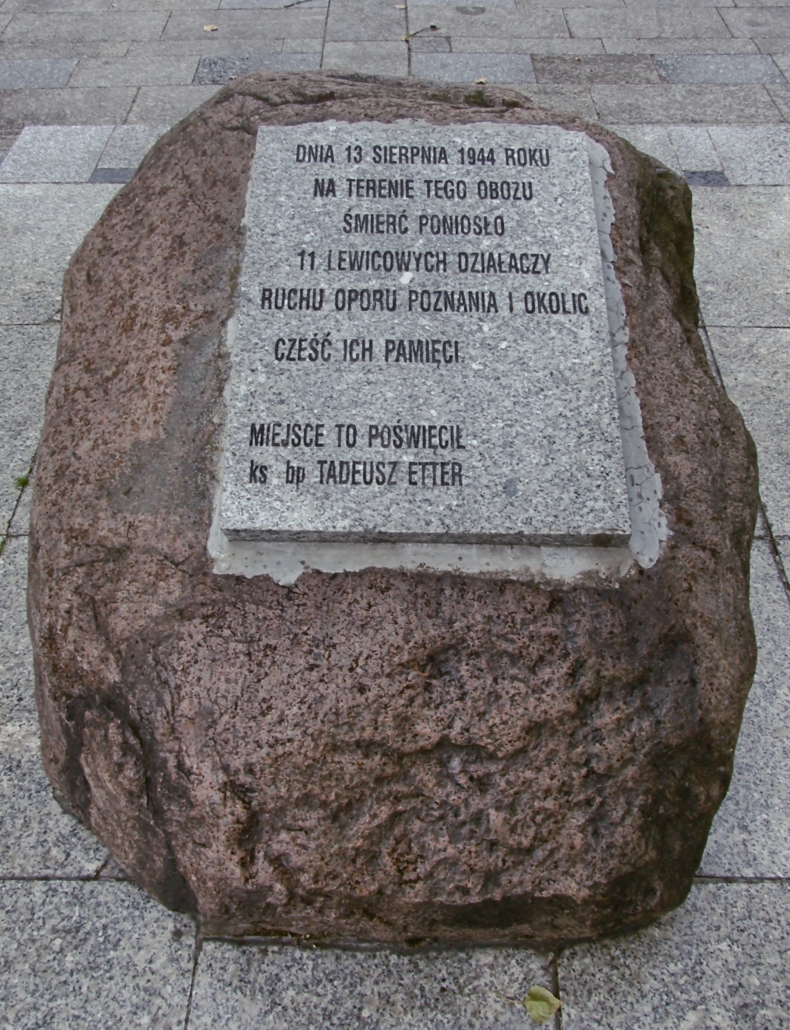 Luboń, Hitlerowski obóz w Luboniu-Żabikowie; Miejsce Pamięci Narodowej